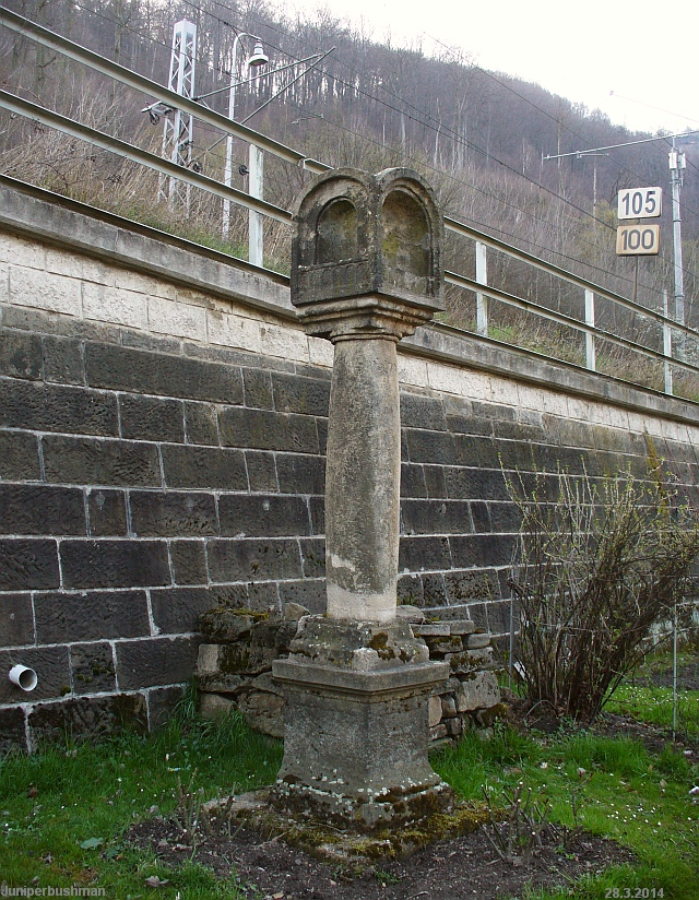 Boží muka, u podjezdu pod zastávkou Děčín-Čertova Voda, parc. 1281/2, Prostřední Žleb.